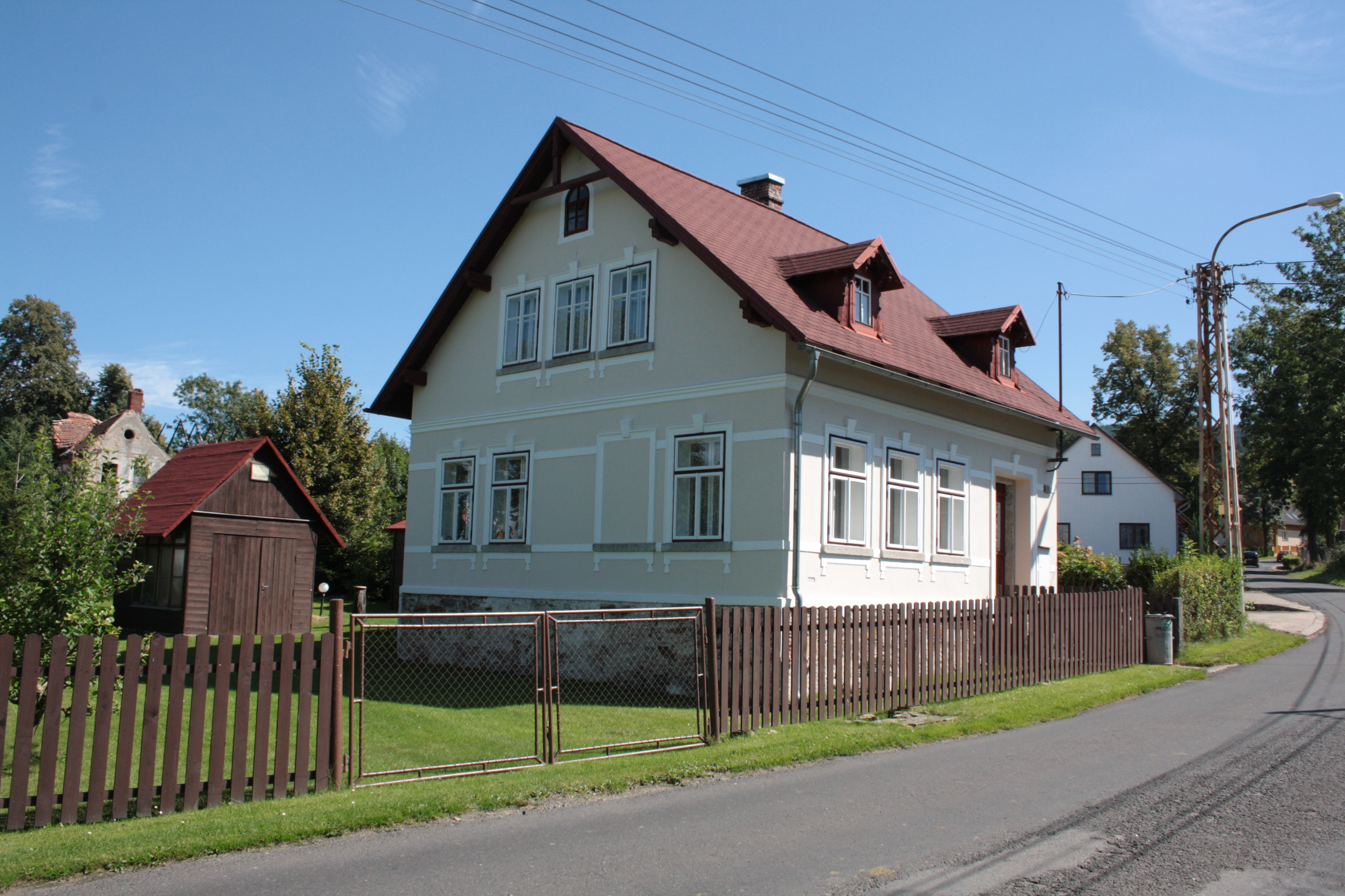 This photograph was taken with a DSLR from WMCZ's Camera grant. Dům číslo popisné 238 v Ludvíkově pod Smrkem.